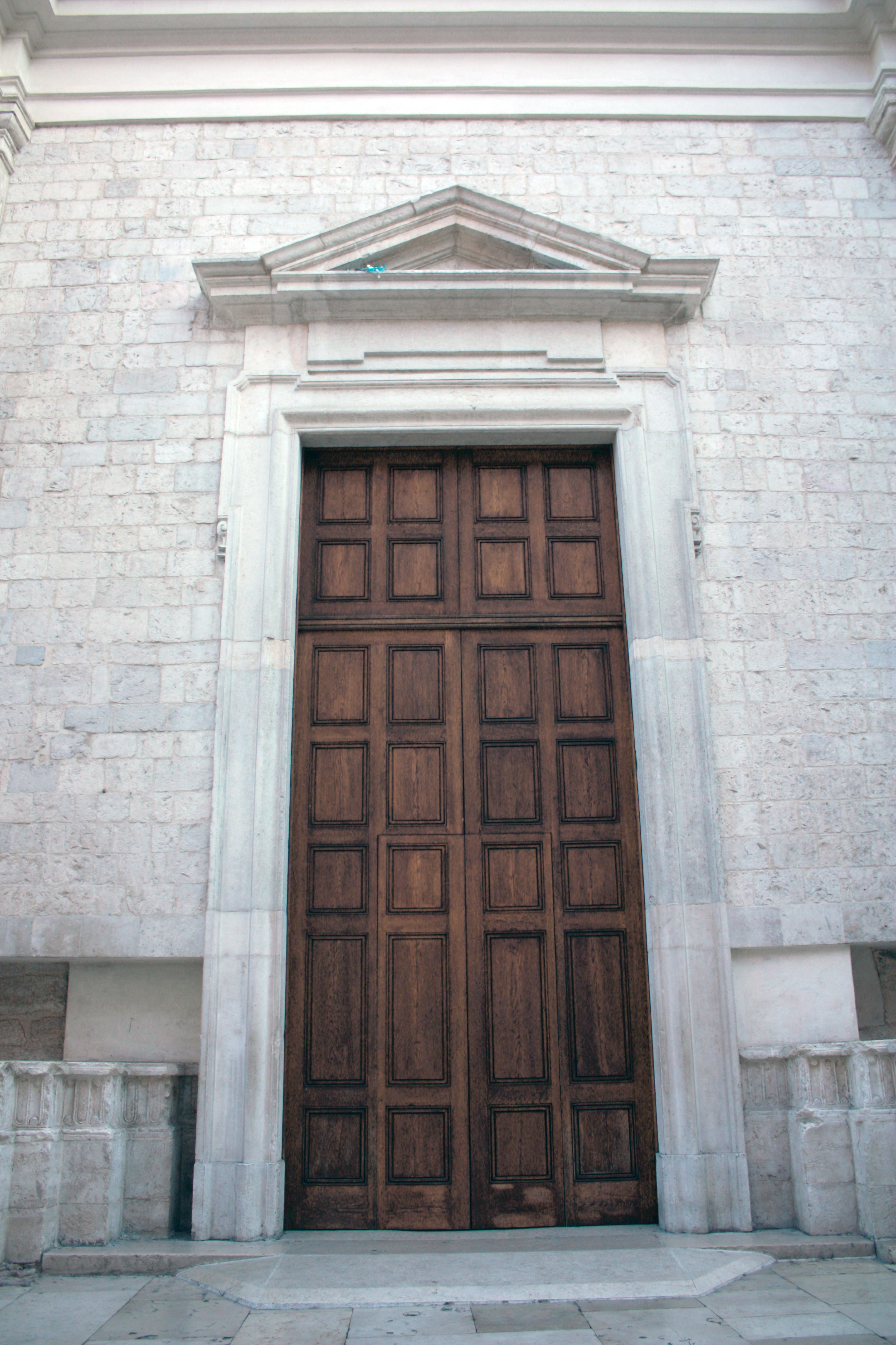 Barletta Basilica del Santo Sepolcro. Portale principale sul lato ovest